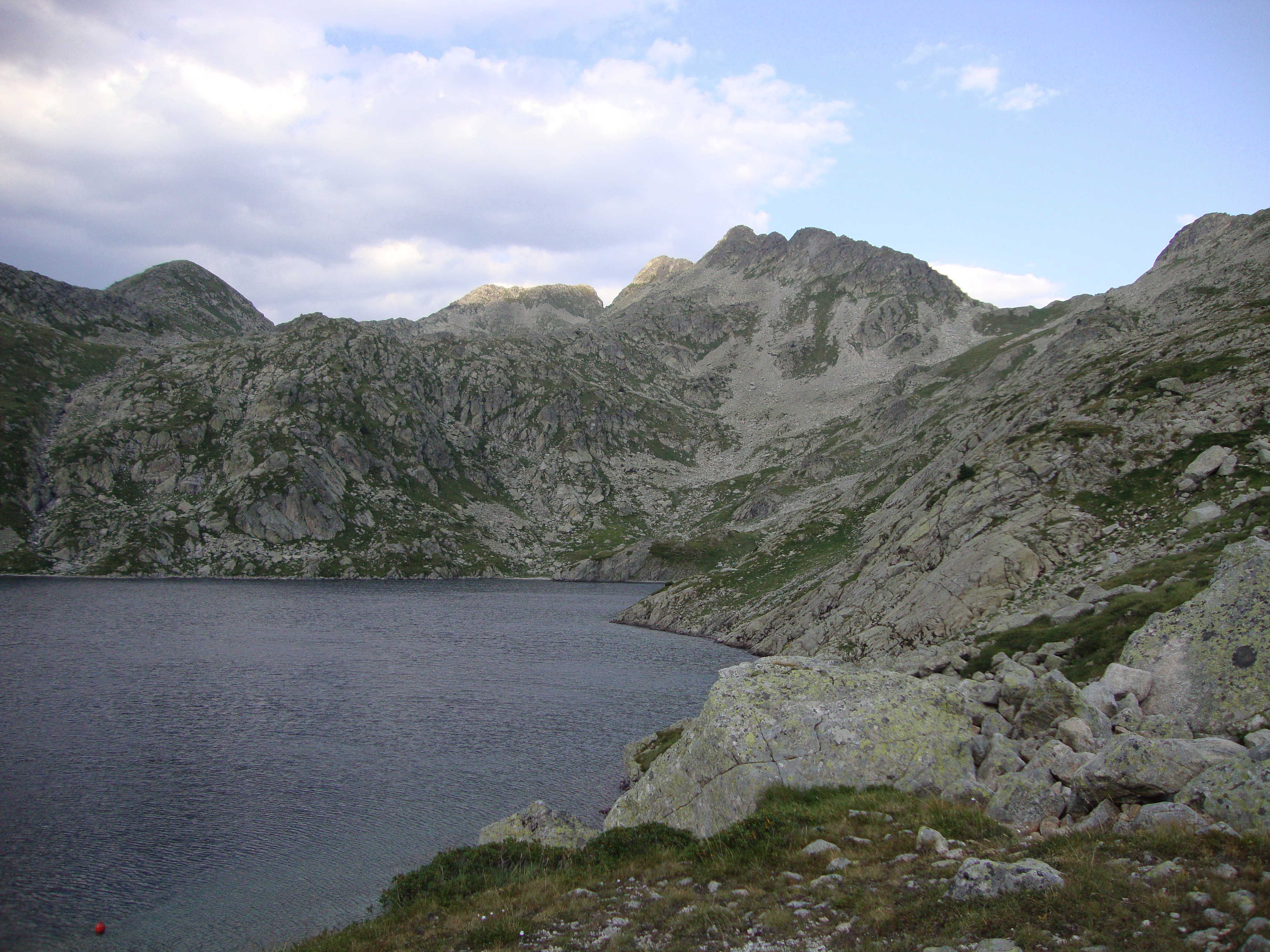 Tuc de Sarrahèra desde el Lac Redon